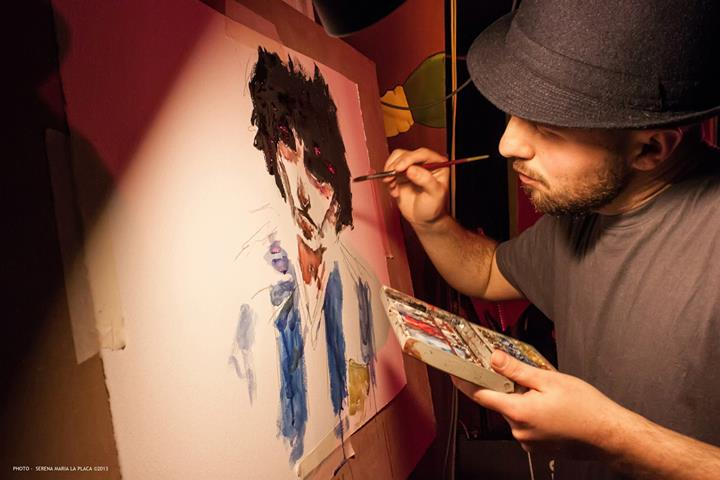 Paolo Castaldi - Live painting all'Arci Malabrocca, Milano.